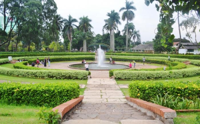 Air Mancur